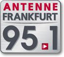 Logo von Antenne Frankfurt 95.1